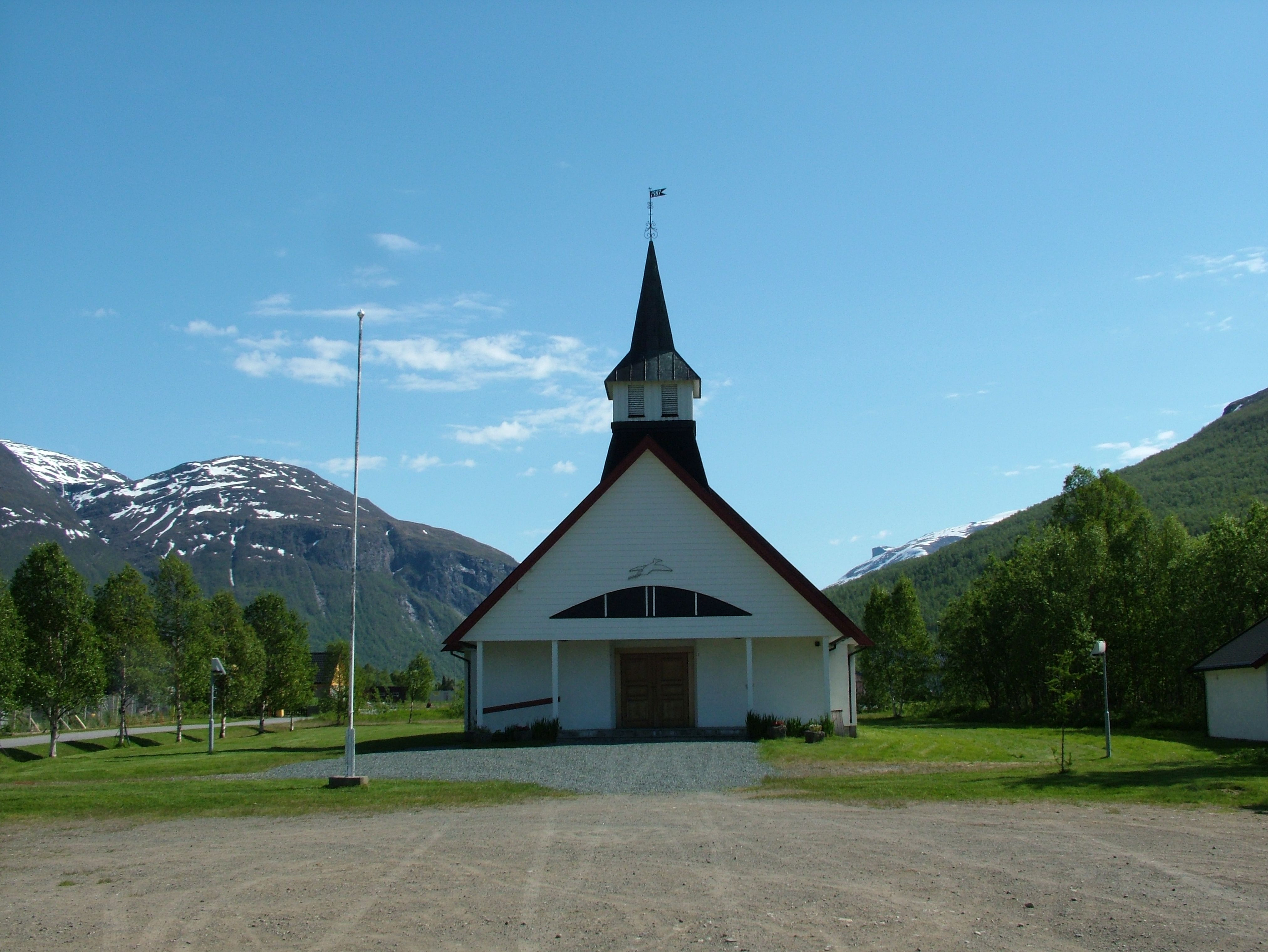 Nordkjosbotn in Nordnorwegen. Die Kirche wurde 1987 erbaut und fasst etwa 260 Personen.